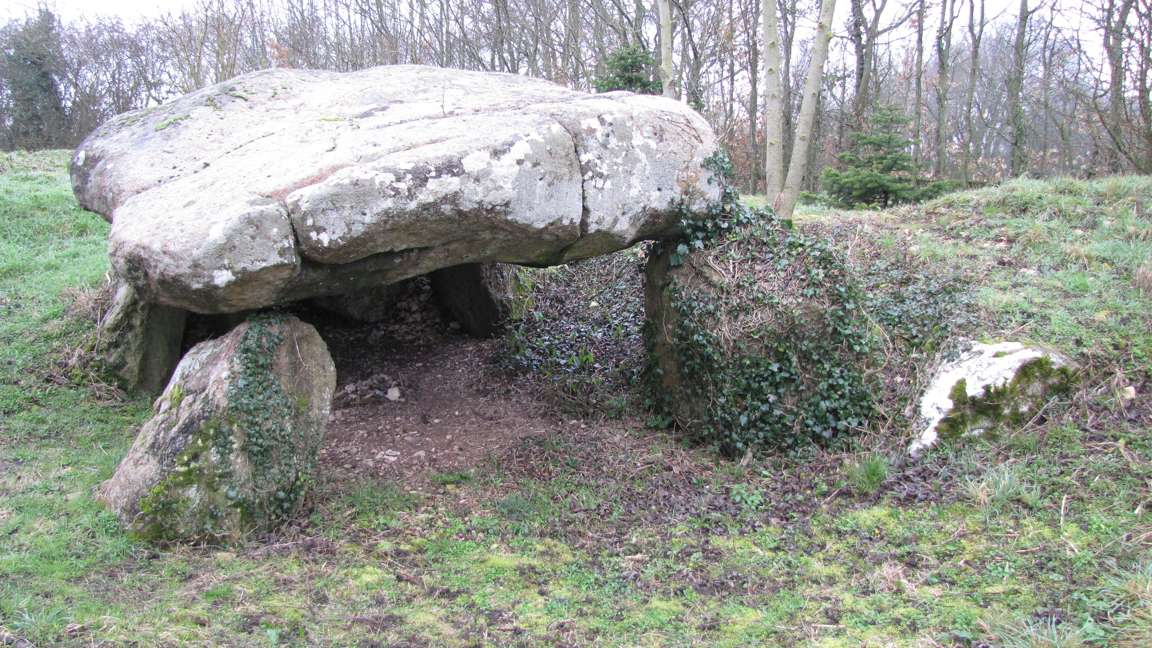 La pierre aux Bignes ou le dolmen des Bignes.